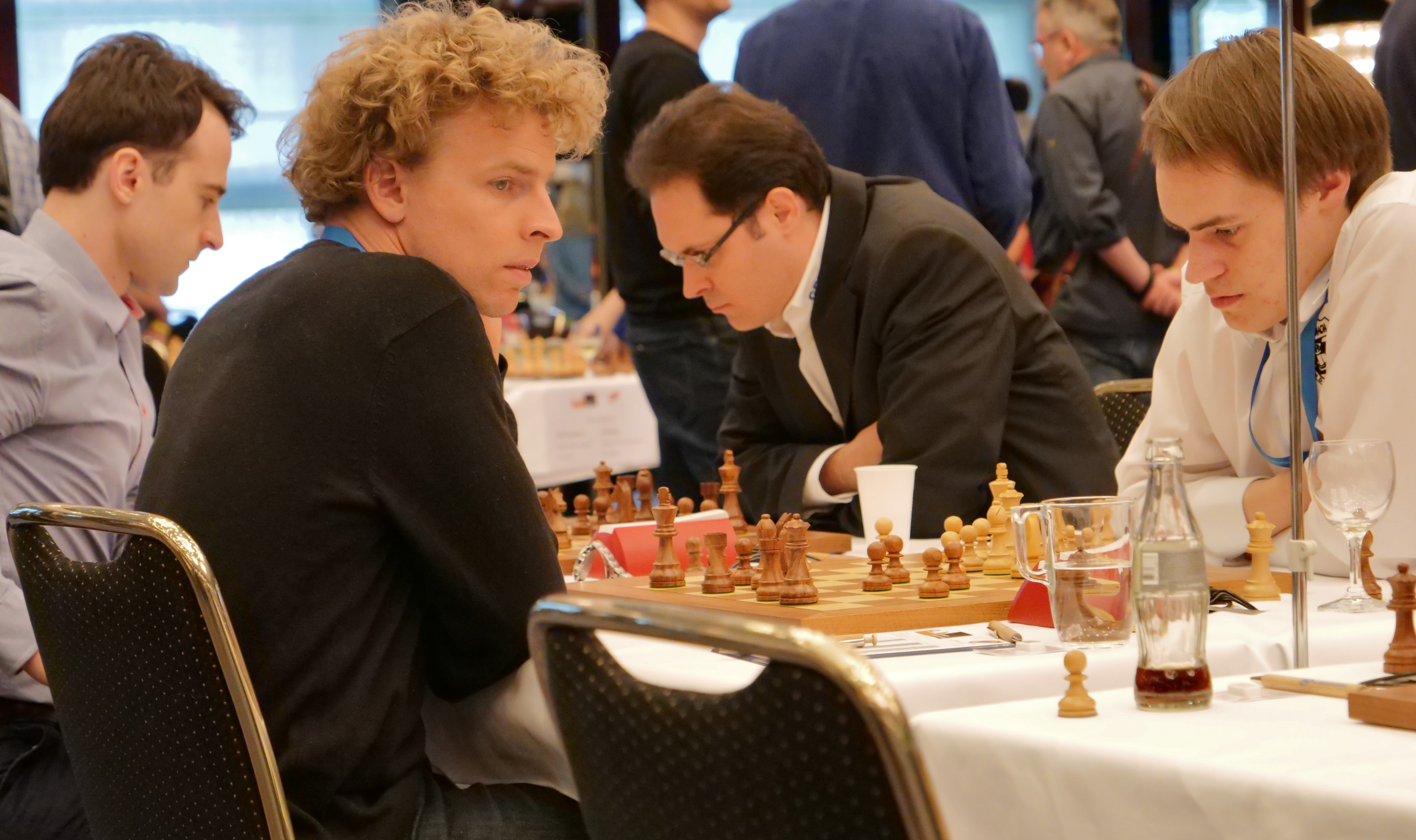 Großmeistertreffen Bundesliga-Finalrunde 30-4-2018